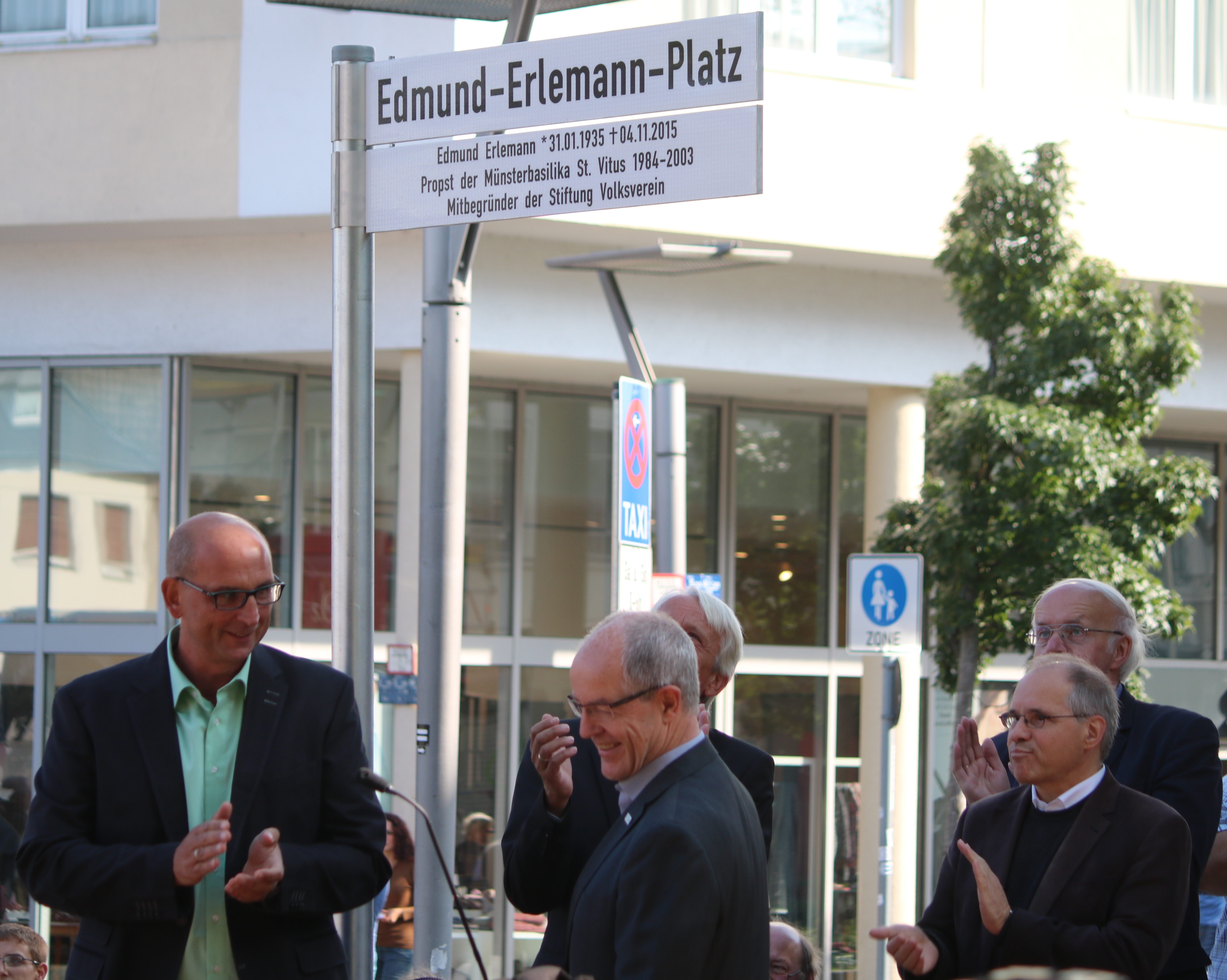 Einweihung des Edmund-Erlemann-Platz am 24.09. 2016 in Mönchengladbach. Von Rechts nach Links die Sprecher: Johannes Eschweiler (Vorsitzender der Stiftung Volksverein Mönchengladbach), Hans Wilhelm Reiners (Oberbürgermeister Mönchengladbach) und Dr. Peter Blättler (Probst St. Vitus)